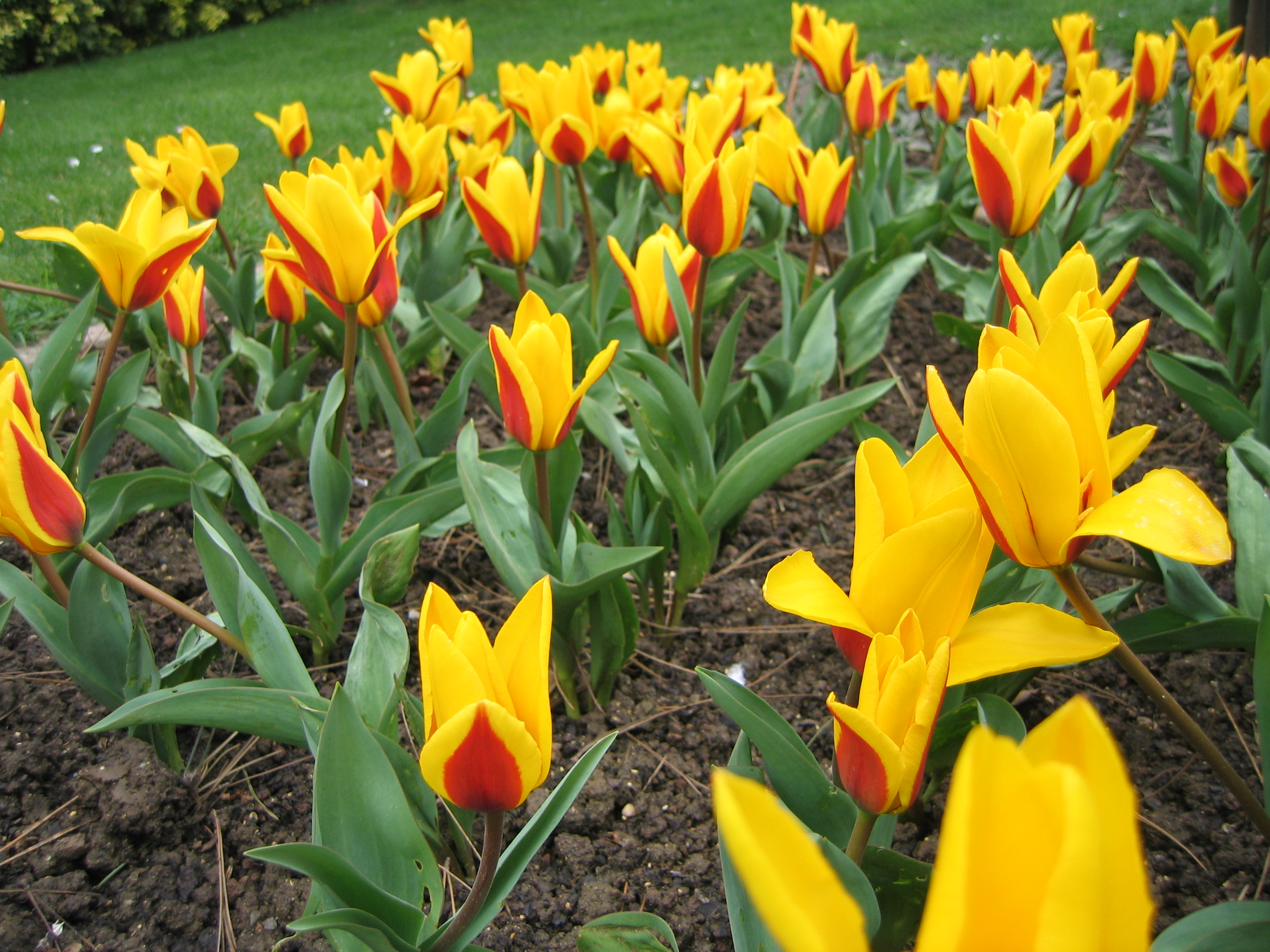 Tulipa kaufmanniana - tulipe Goudstuck au parc floral de Paris